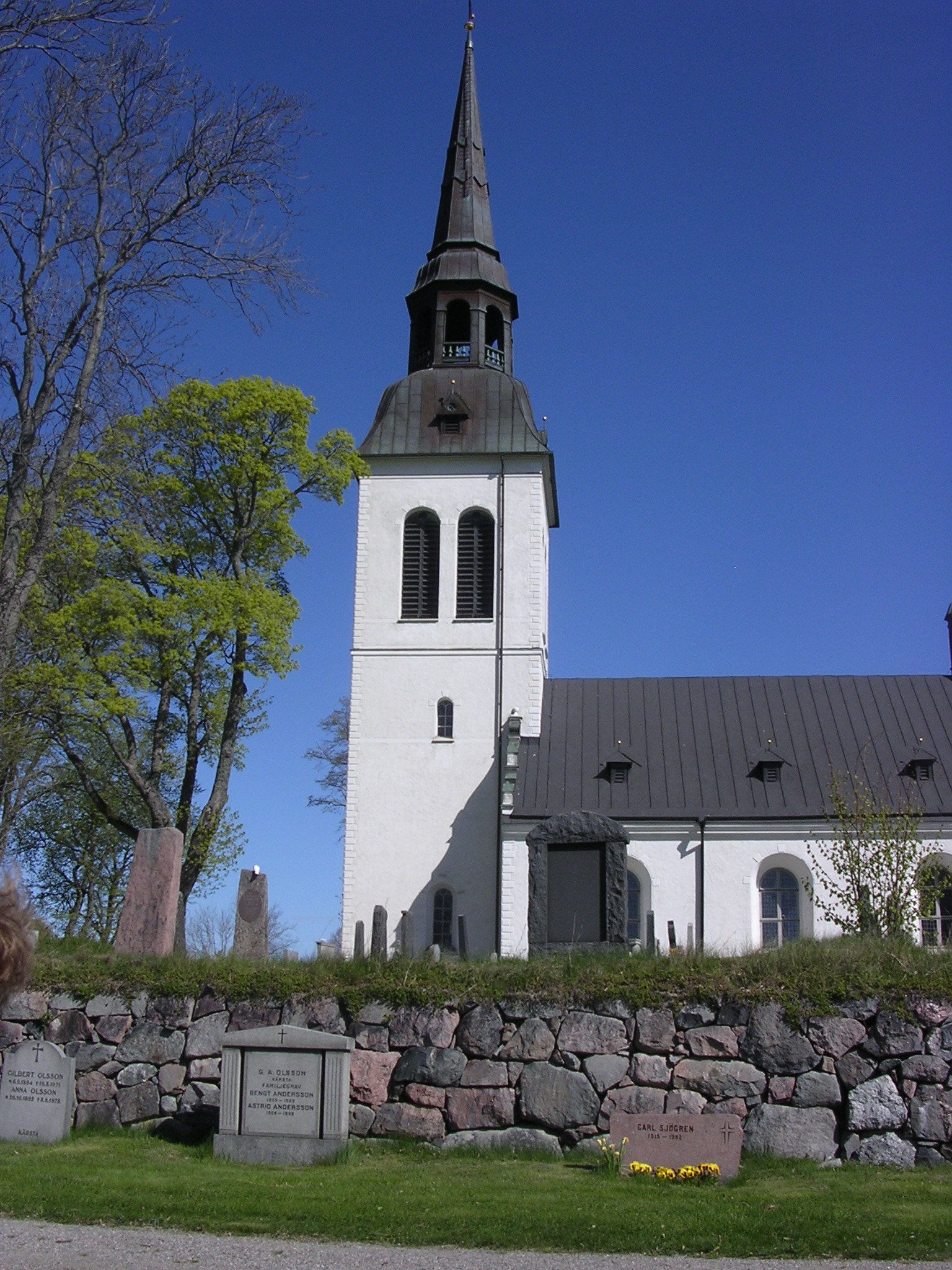 Lunda kyrka (strängnäs stift)